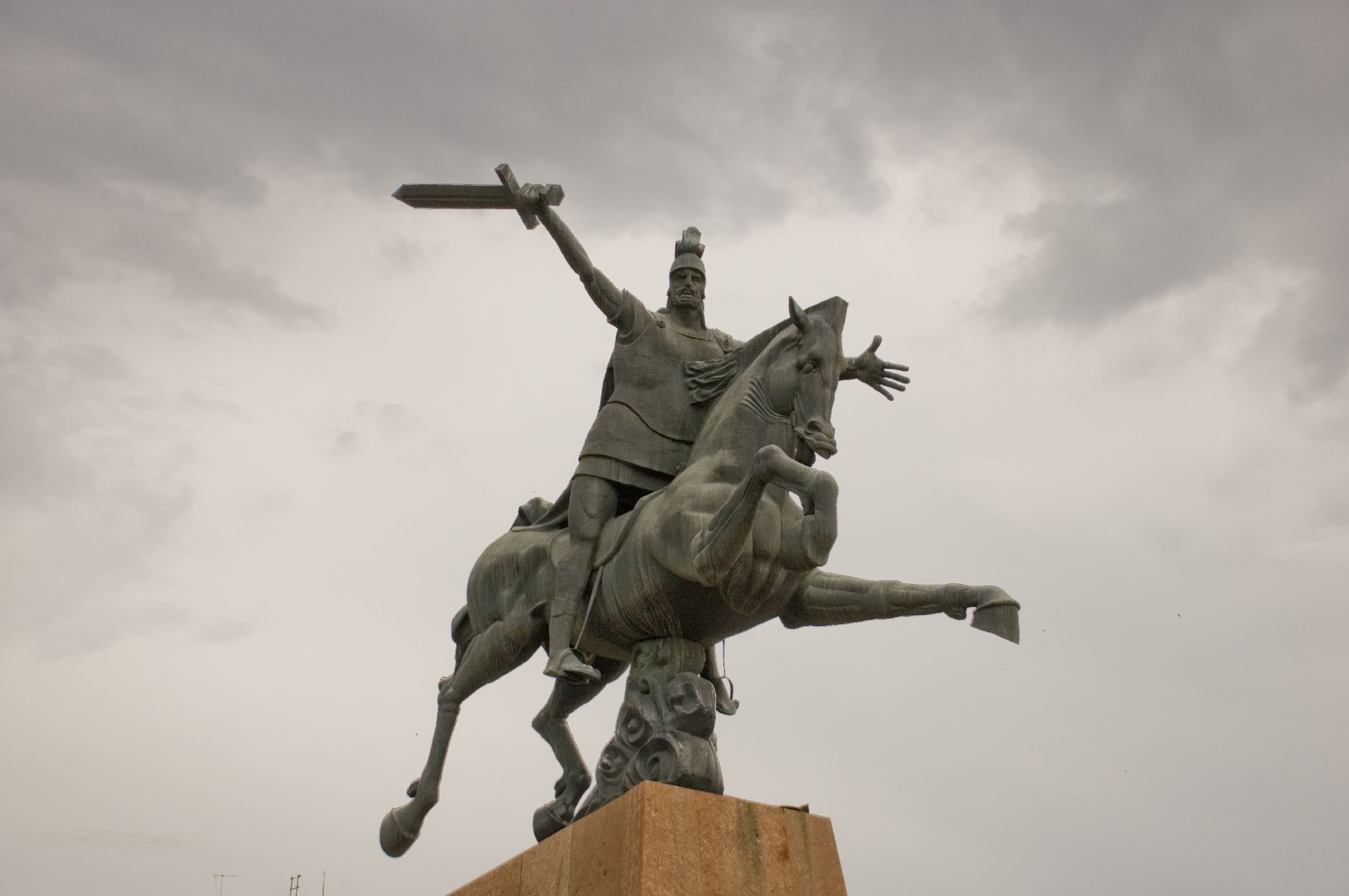 Vardan Mamikonian statue in Yerevan, Armenia